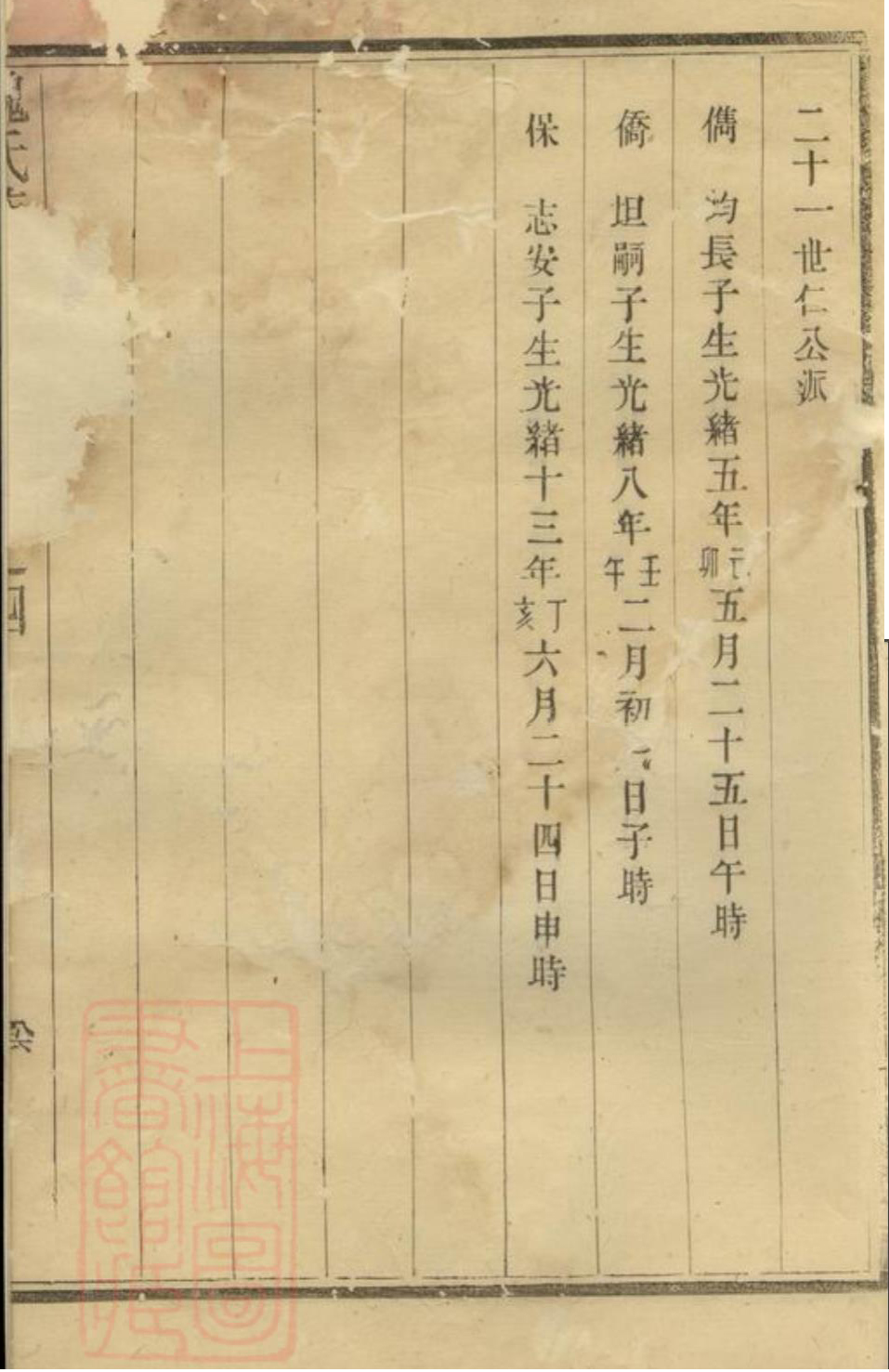 兴化魏氏家谱六卷（清）魏潢纂修。清光绪十四年（1888）木活字本，六册。第4卷172页。上海图书馆馆藏版。